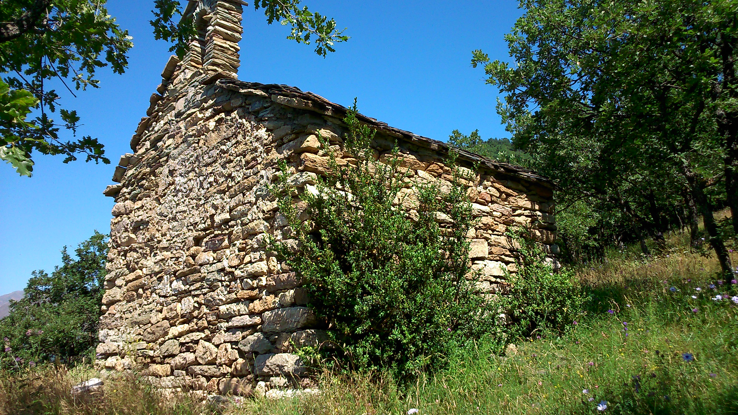 Ermita romànica del segle XI Sant Salvador de Casós és una ermita del poble de Casós, de l'antic terme de Llesp, actualment pertanyent al terme del Pont de Suert, en un enclavament dins del terme de Vilaller. Tanmateix, a causa de la petitesa de l'enclavament, aquesta ermita és en terme de Vilaller. Està situada en un lloc aïllat i solitari, al nord-est del poble. És un temple petit, d'una sola nau.